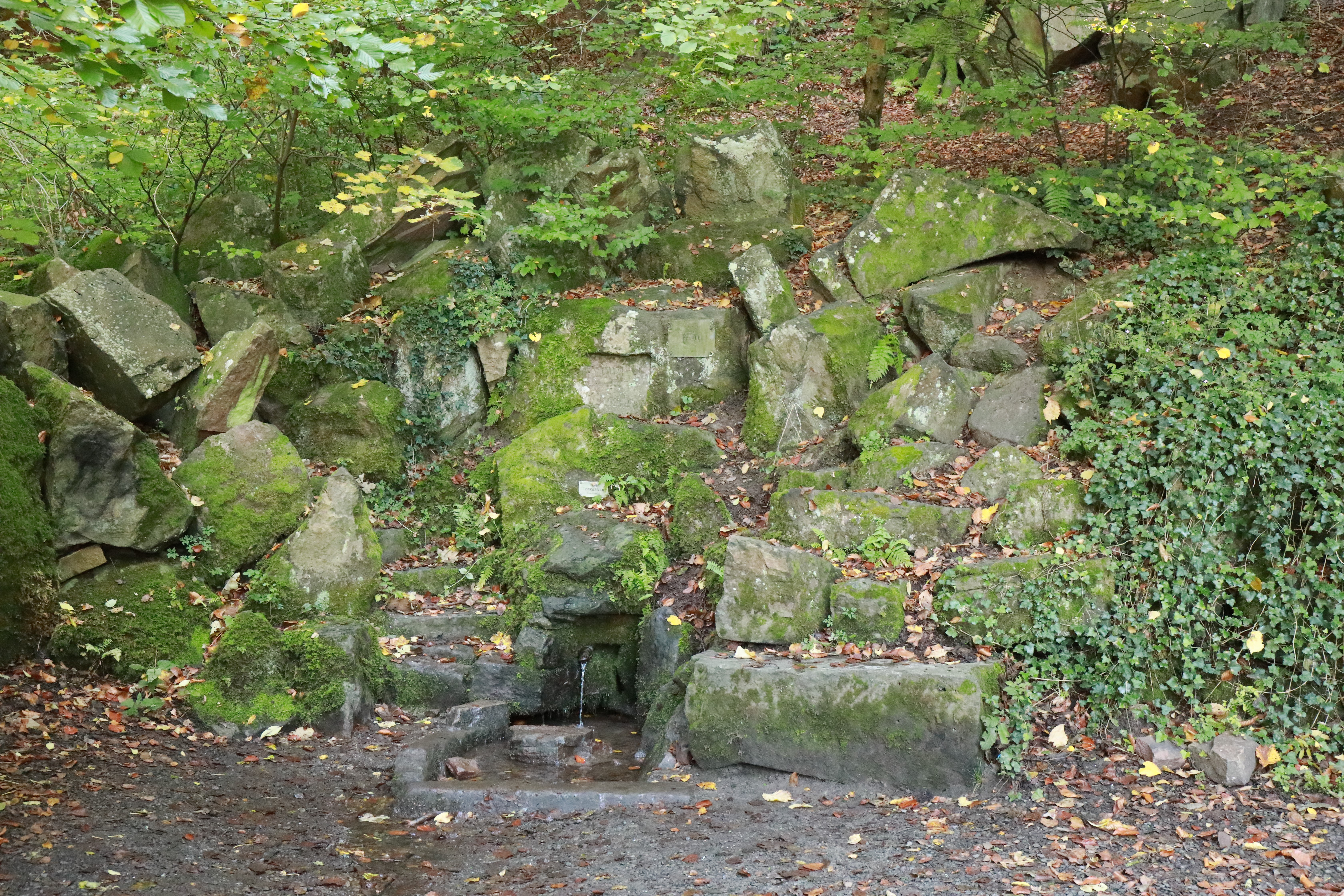 Hedwigquelle